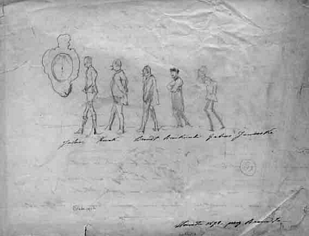 Силуети "Юльця" Дзедушицького (1817-1885), Юзефа Брандта, Бєньковського, "Ґабуся" Яворського і Юліуша Коссака під час відвідин Славути. Рисунок олівцем.